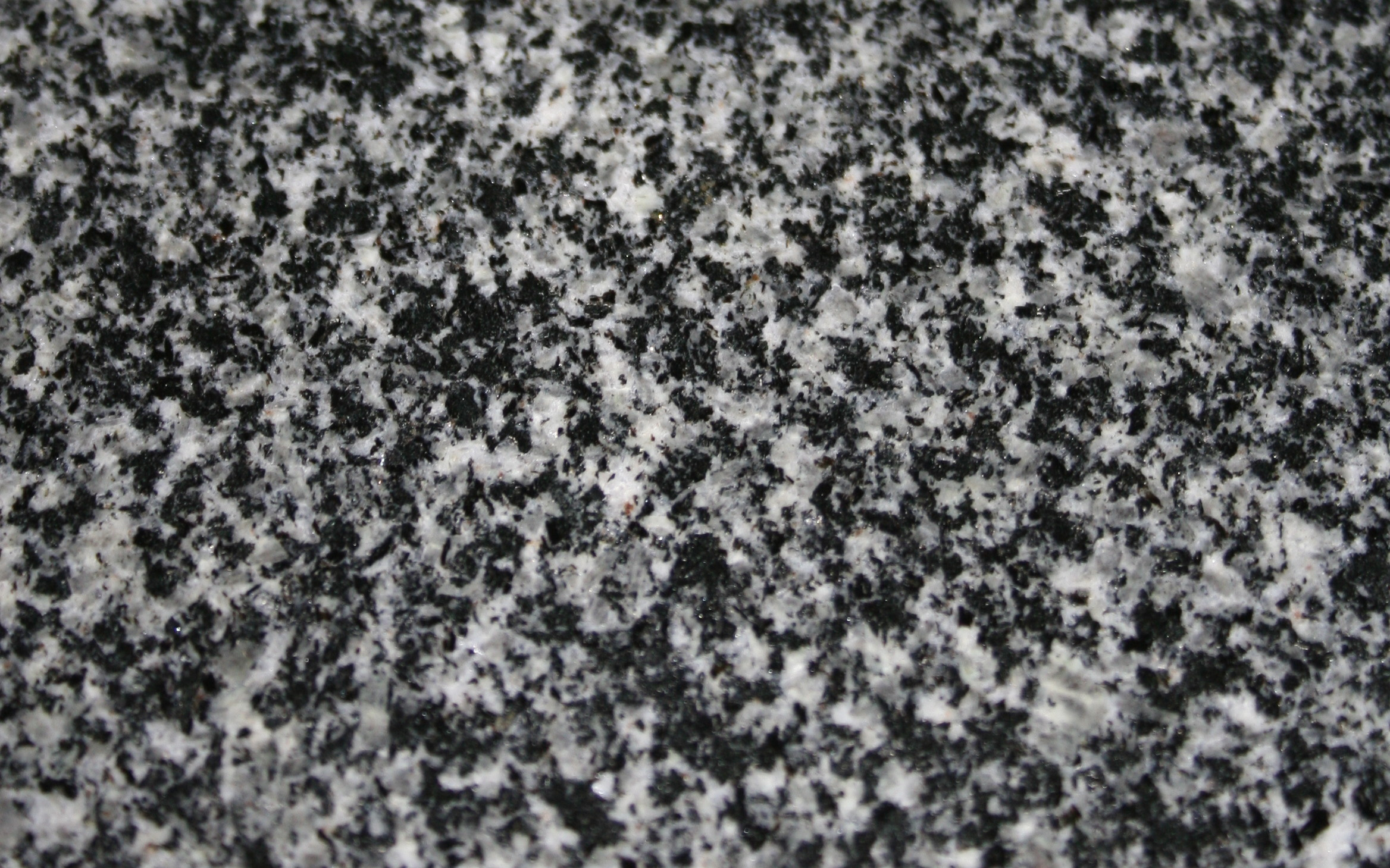 Fürsstenstein-Tonalit, Muster ca. 9 x 15 cm